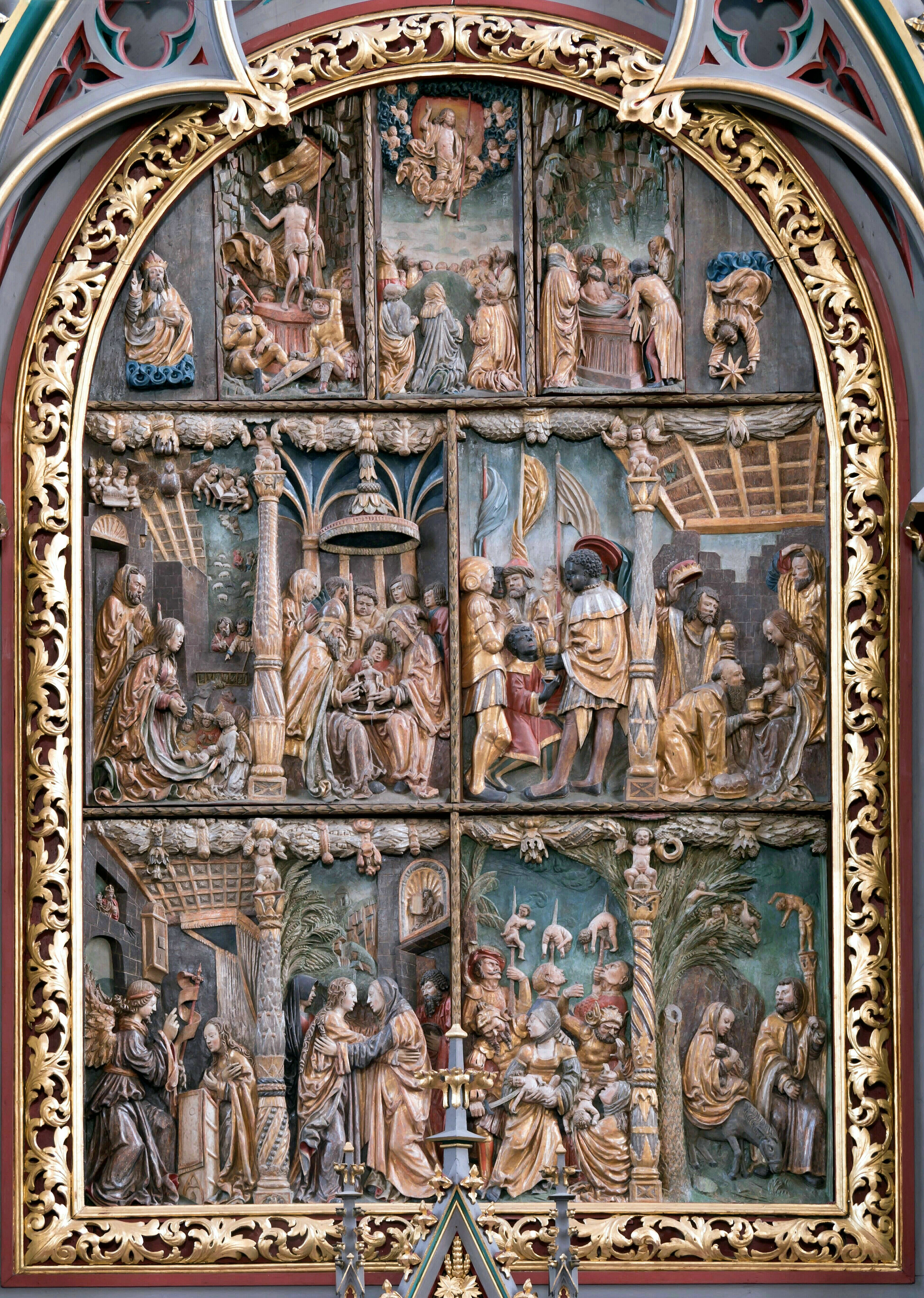 Spätgotischer Altar mit 13 Holzreliefs aus dem Leben von Jesus, um 1520; vermutlich aus der Koblenzer Werkstatt von Meister Jacob, einem Schüler von Hans Backoffen.